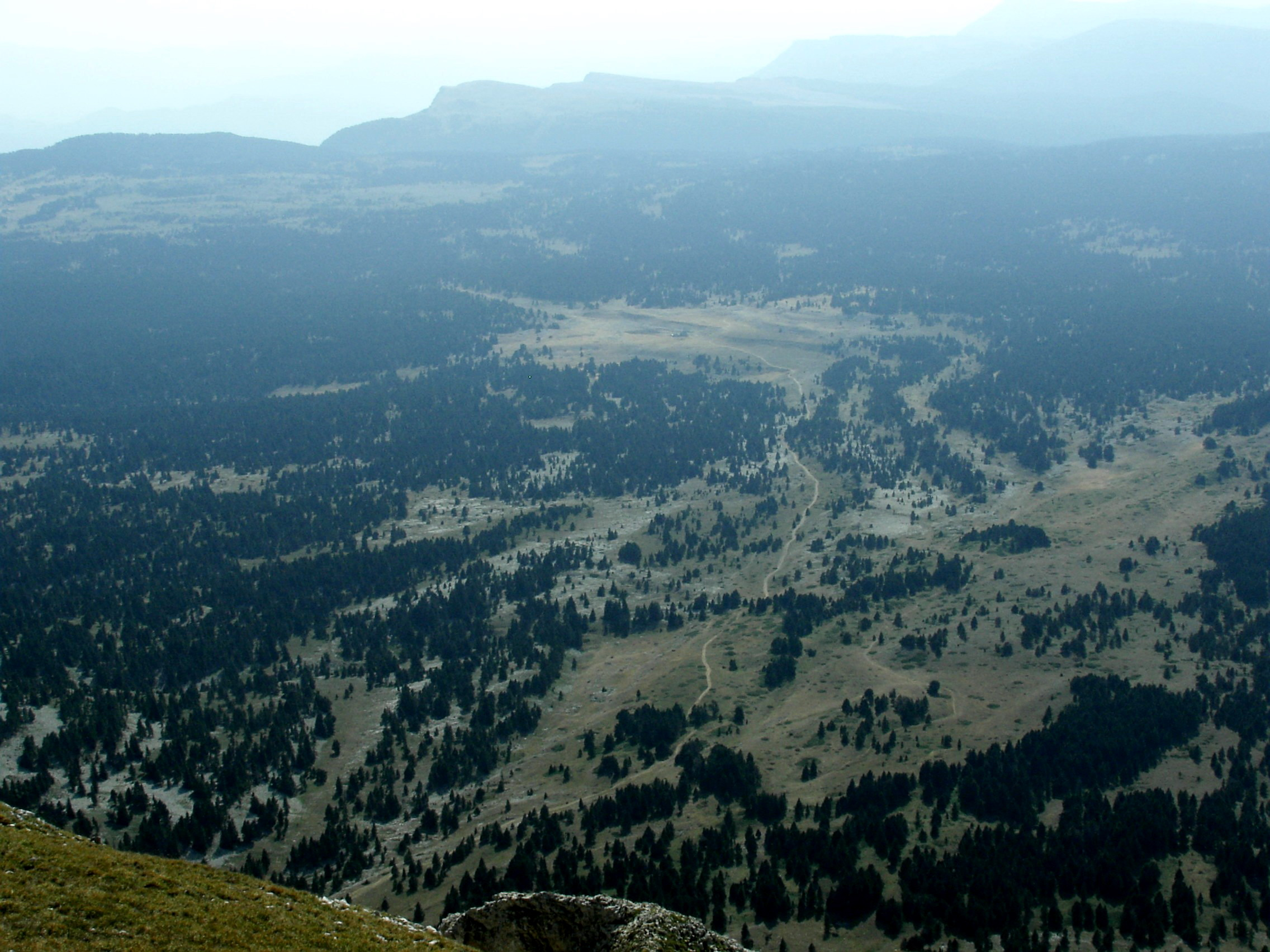 Hauts Plateaux du Vercors, seen from le Grand Veymont